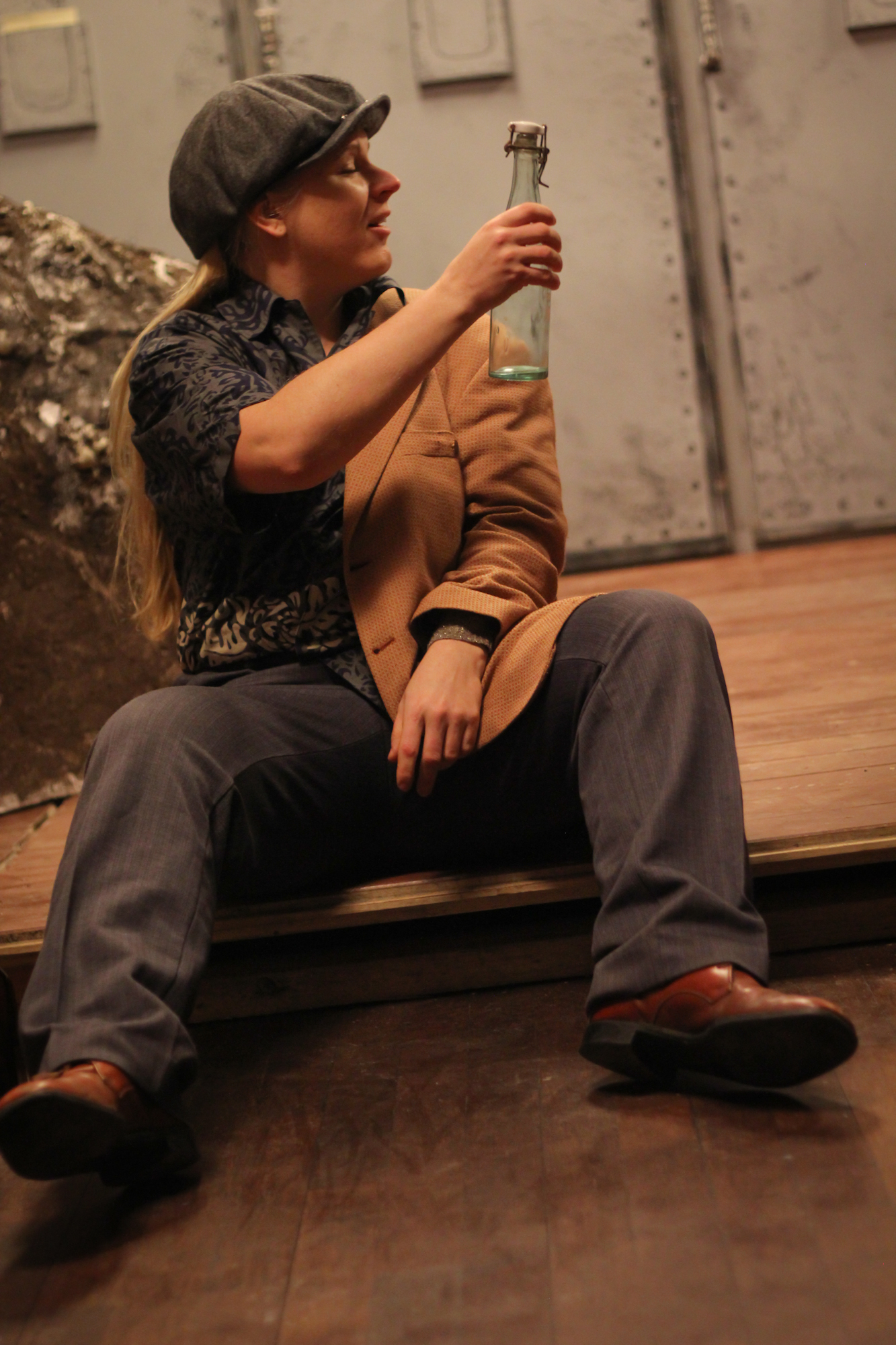 Timukas (Ingrid Ulst) lavastuses "Minut minuti haaval" (2013)